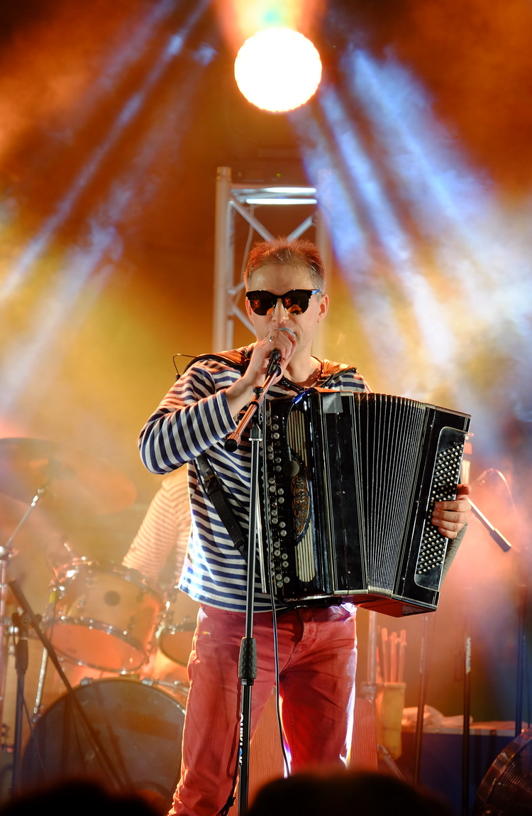 Фёдор Чистяков на концерте "Ноль+30", Ельцин-центр, Екатеринбург, 15 апреля 2017